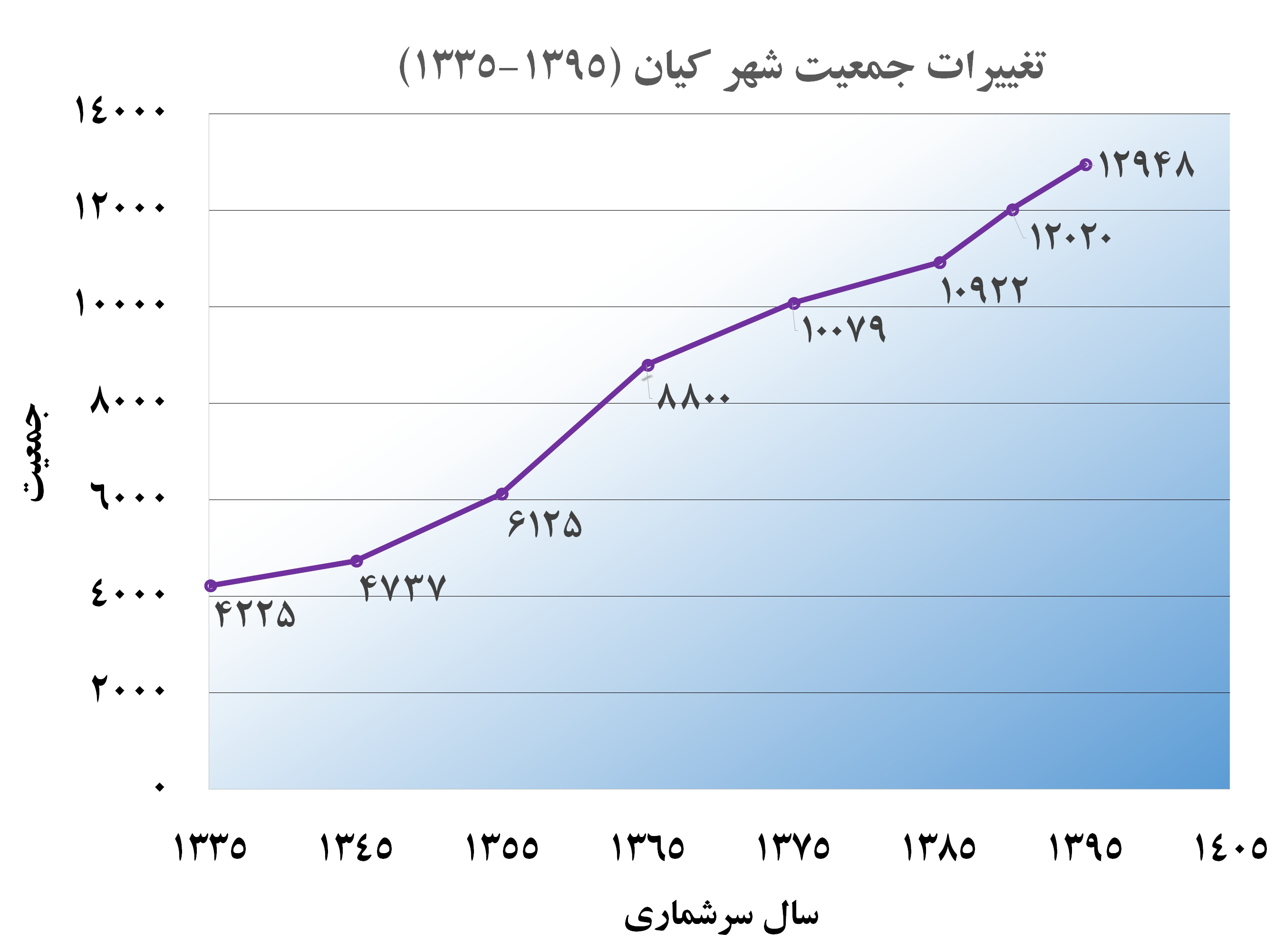 (1335-1395) تغییرات جمعیت شهر کیان